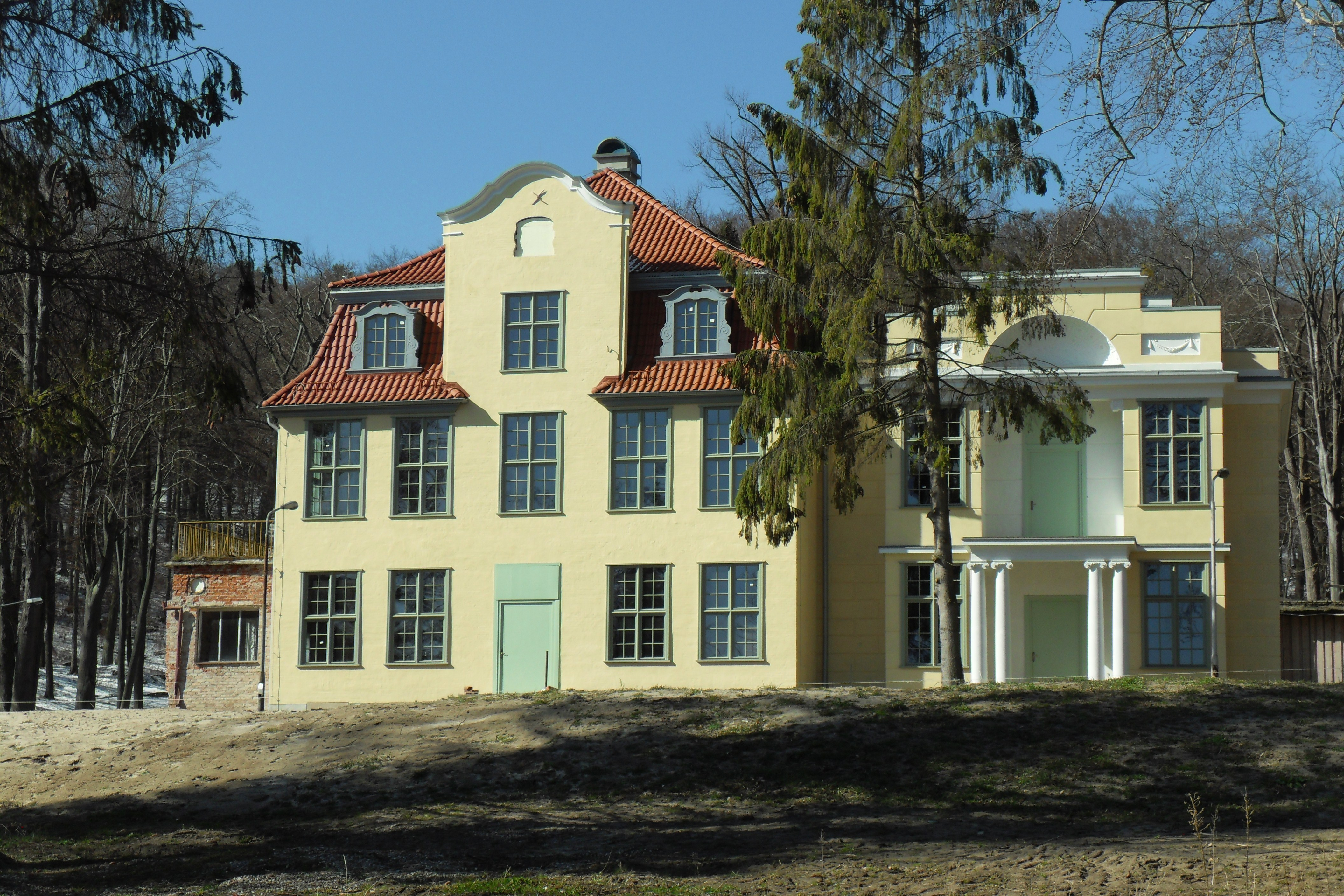 Gdańsk VII Dwór, ul. Polanki 117 - zespół dworu V Anielski Dwór, obecnie AMW, kon.XVIII/XIX